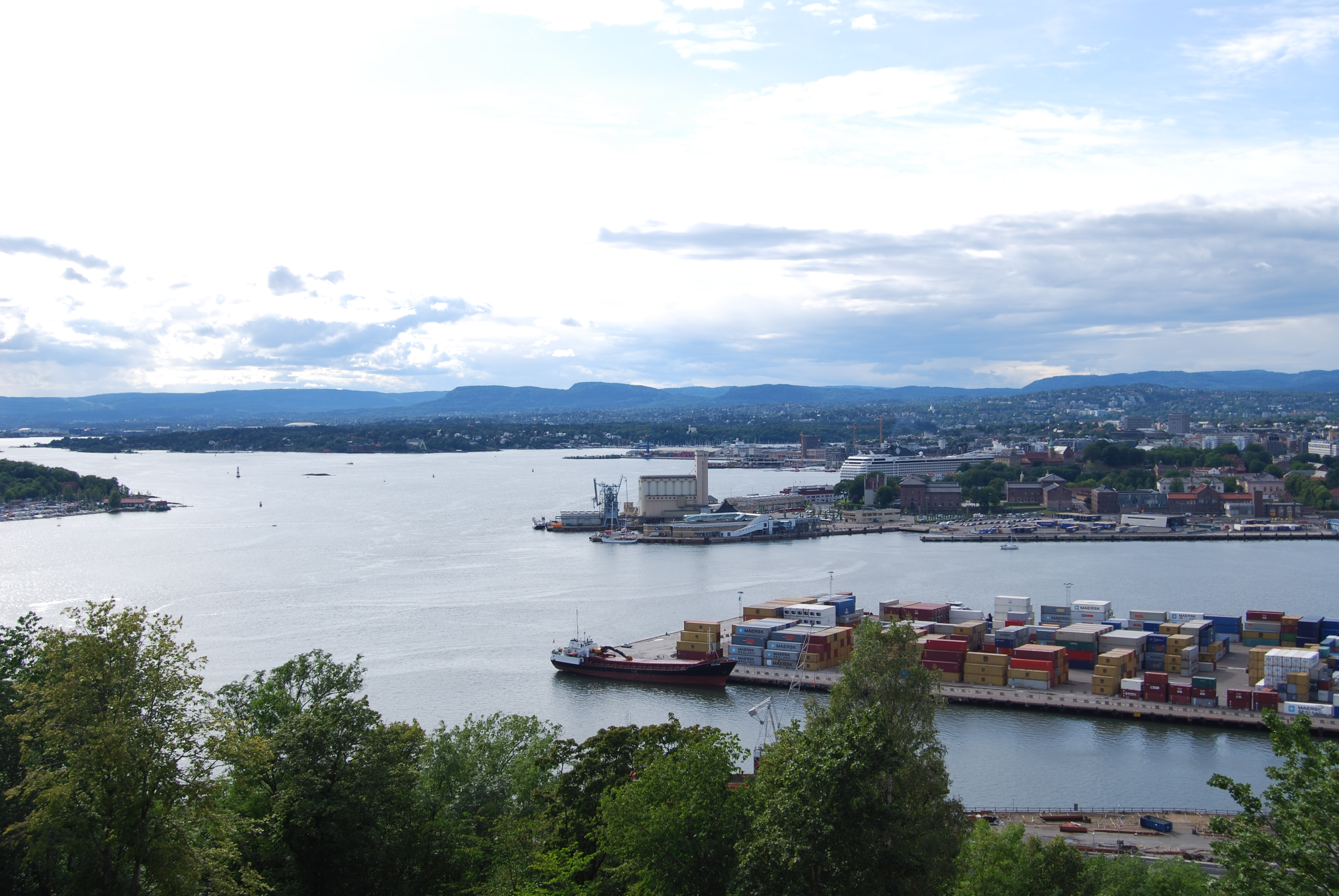 Oslo. Widok 2009